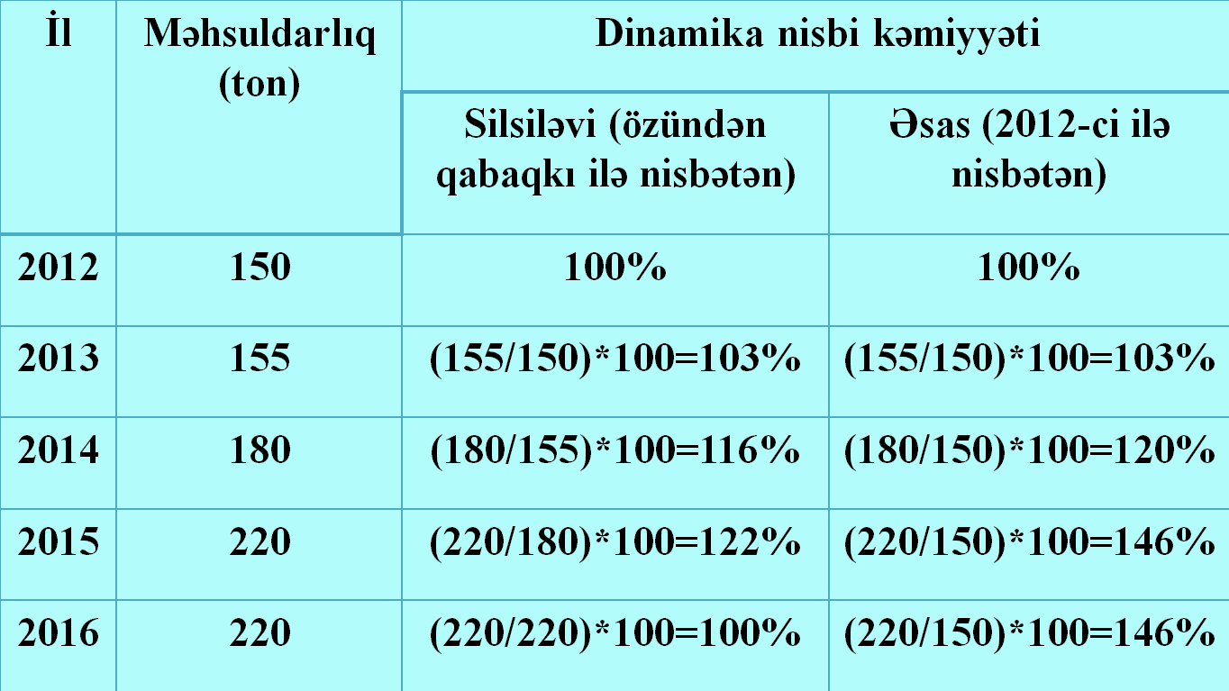 Dinamika nisbi kəmiyyəti